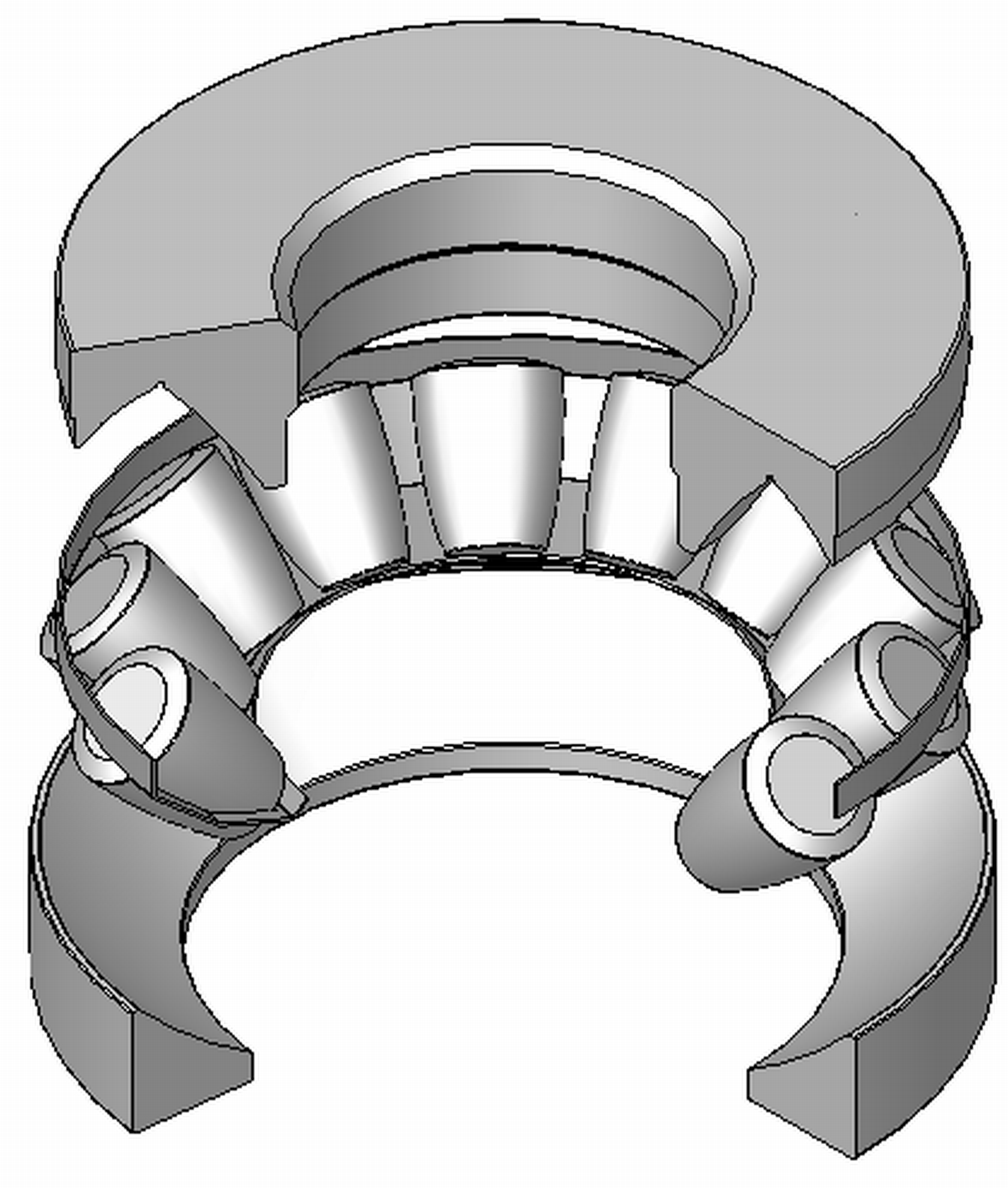 Axialpendelrollenlager, zerlegbar, Blechkaefig aus Stahl, Explosionsdarstellung, 120°Schnitt, Hinweis: Innenaufbau des Lagers (insbesondere des Kaefigs) variiert je nach Hersteller und Baugroesse rolling contact bearings